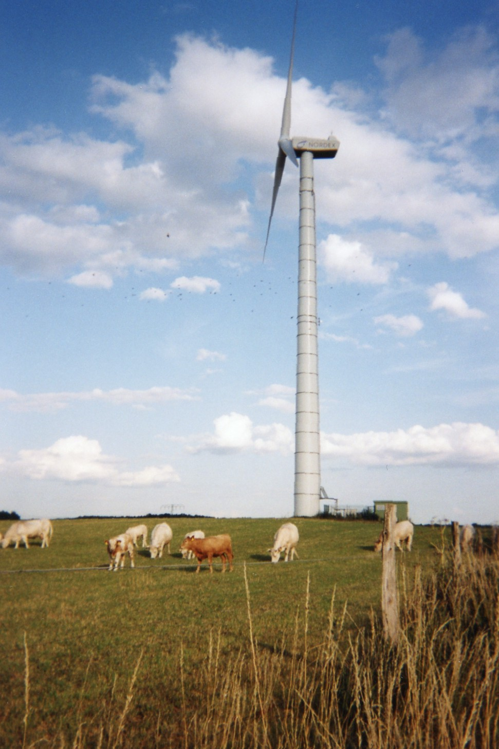 Ortsteil Wandlitz der Gemeinde Wandlitz: Rinder und Windrad